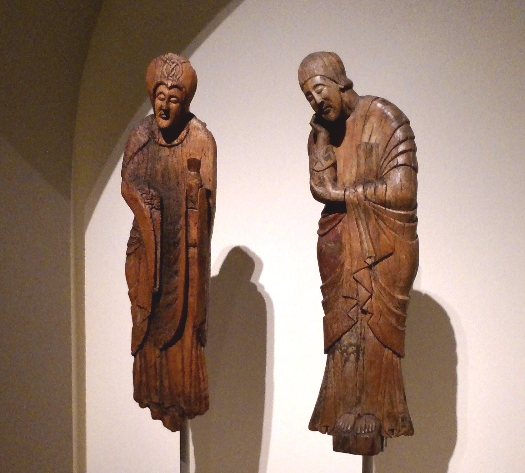 Imágenes de Maria y Juan Bautista pertenecientes al Descendimiento de la iglesia de Santa Eulalia de Erill-la-Vall, del siglo XII, conservadas en el Museo Nacional de Arte de Cataluña (Barcelon)